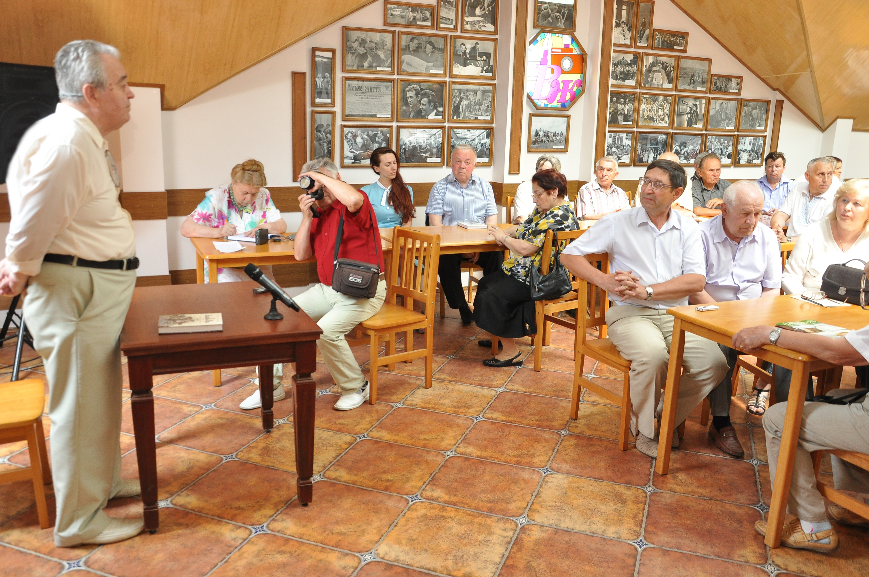 Український письменник, дослідник історії, автор бестселерів «Країна Моксель, або Московія», «Москва Ординська» та «Україна-Русь» Володимир Броніславович Білінський у редакції газети «Вільне життя плюс» (2015 р.). Серед присутніх — заслужені журналісти України Галина Садовська, Василь Бурма, Михайло Зубик, Микола Шот.